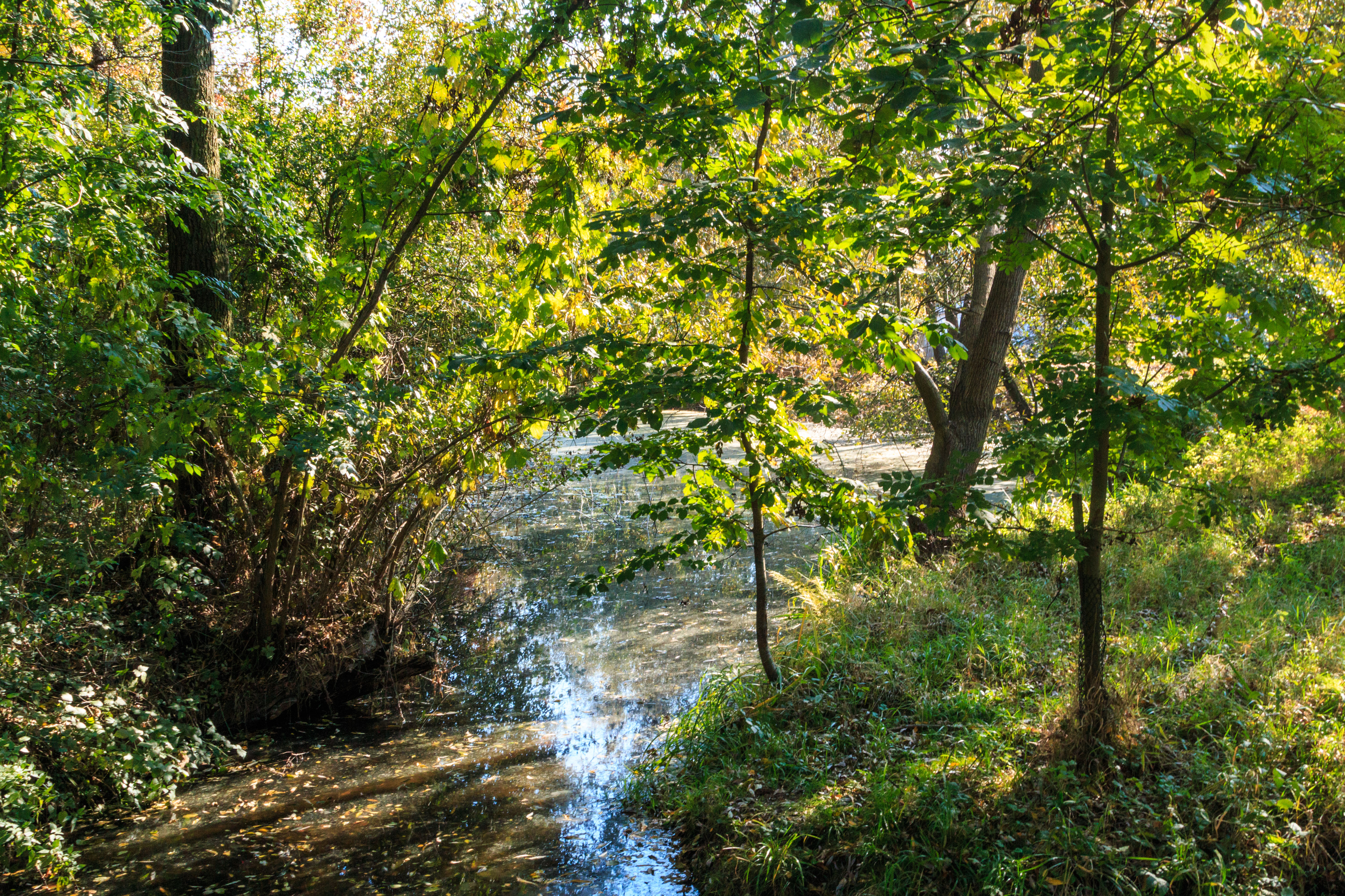 Mrtvé rameno Orlice u Stříbrného rybníka Project: Vodstvo